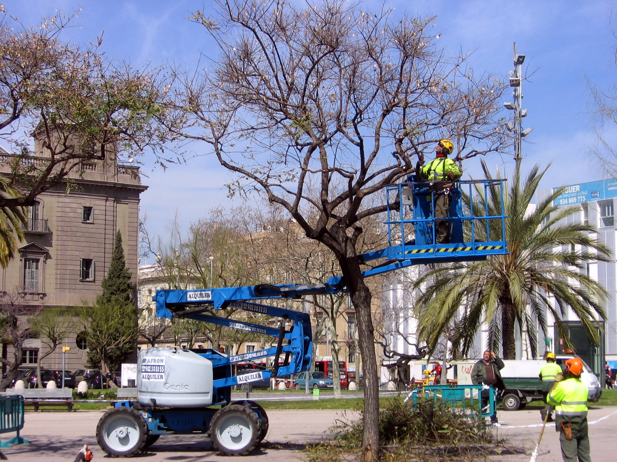 Trabajos de poda de operarios de Parques y Jardines de Barcelona. Plaça de Pau Vila.